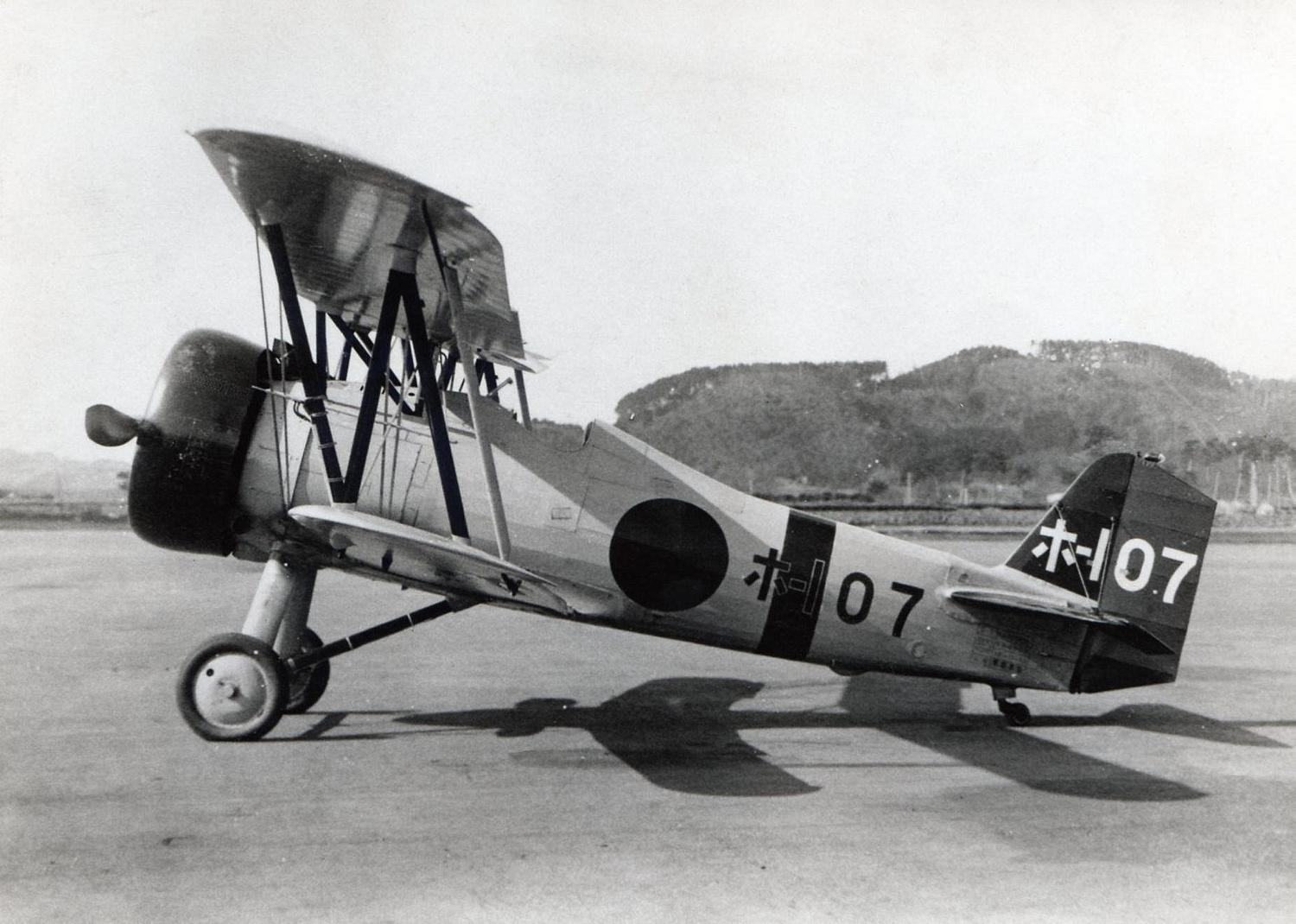 空母「龍驤」所属の95式艦戦。鈴木実中尉機。